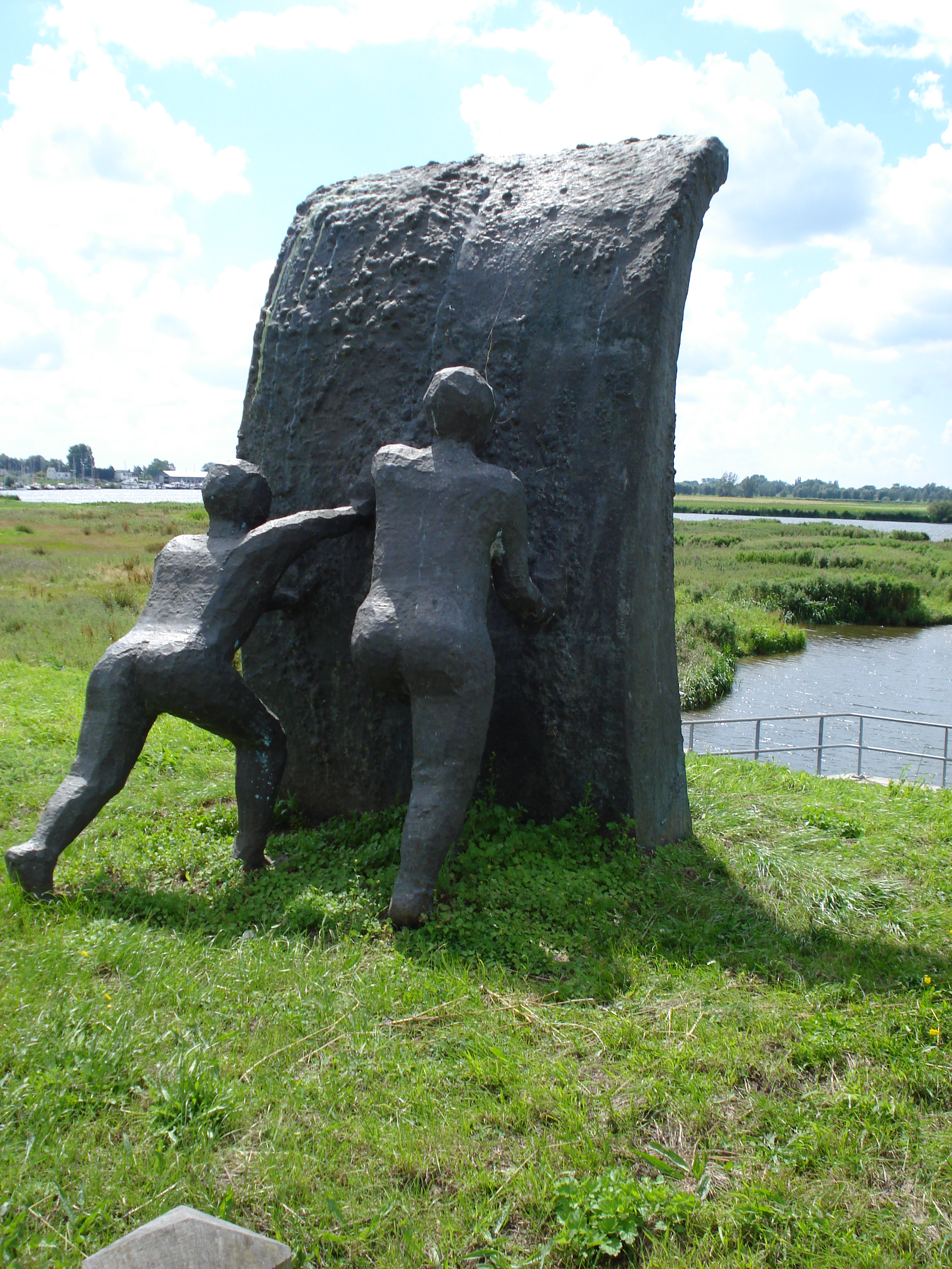 Teeffelen, monument l'eau, amie impétueuse, Jan de Vries / Water, onze onstuimige vriend, door Jan de Vries uit Lithoijen, motorcoureur en kunstenaar, geboren in Oss